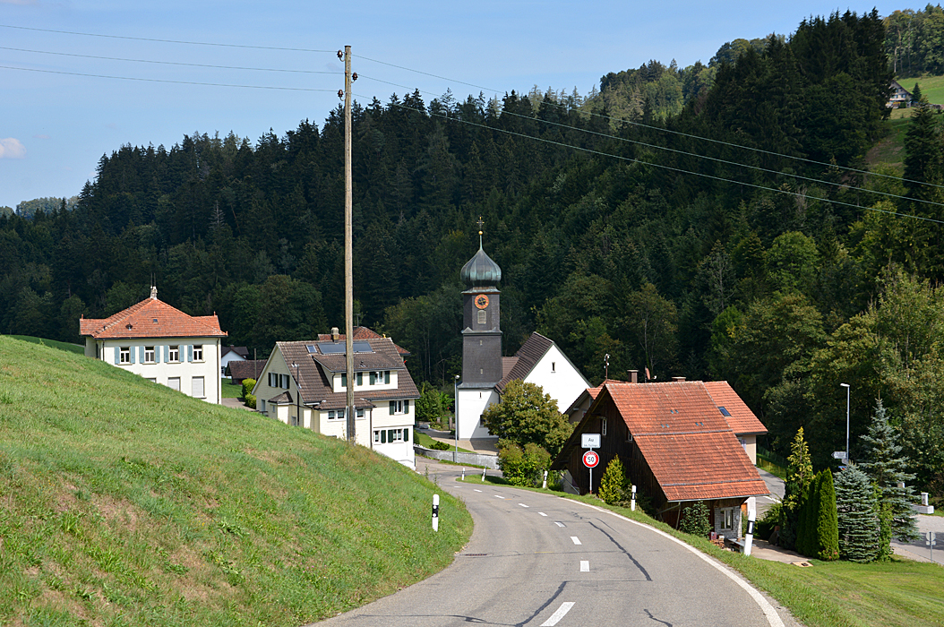 Das Dorf Au bei Fischingen, Kanton Thurgau